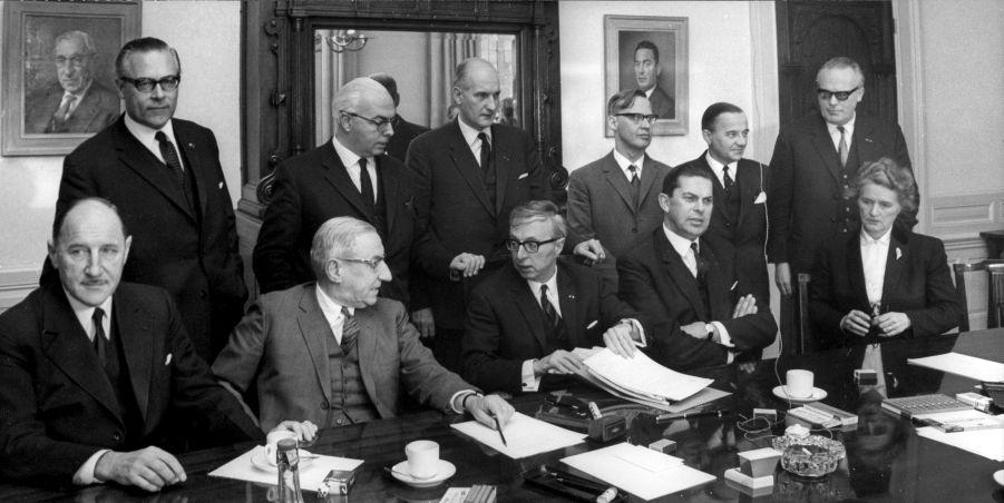 Kabinet Zijlstra (1966-1967). V.l.n.r.: Luns, De Quay, Zijlstra, Biesheuvel, Klompé. Daarachter Witte, Veldkamp, Bot, Diepenhorst, De Jong, Verdam. Den Haag, 21 november 1966.